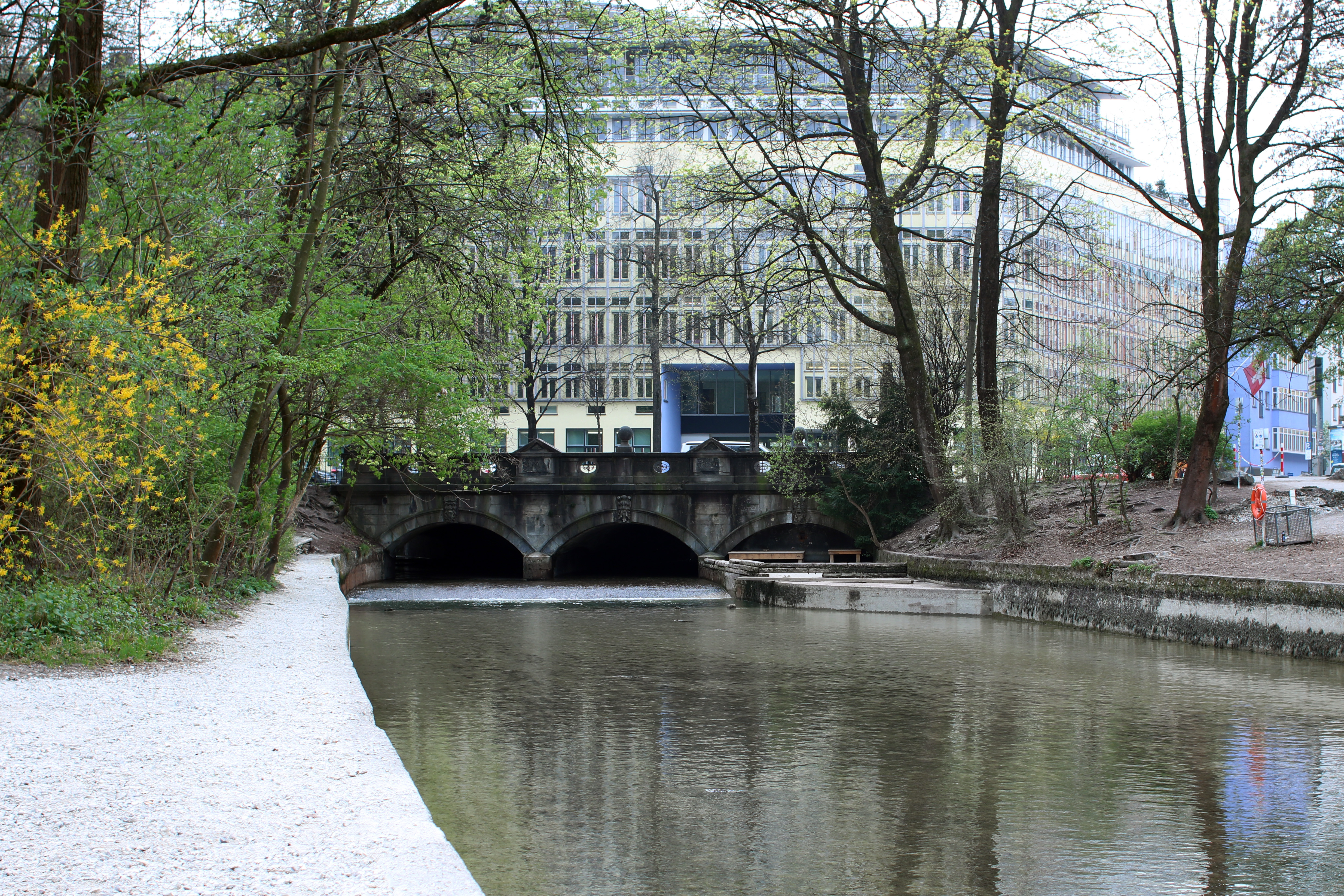 Surferwelle ohne Wasser, Welle und Surfer alle Jahre wieder.